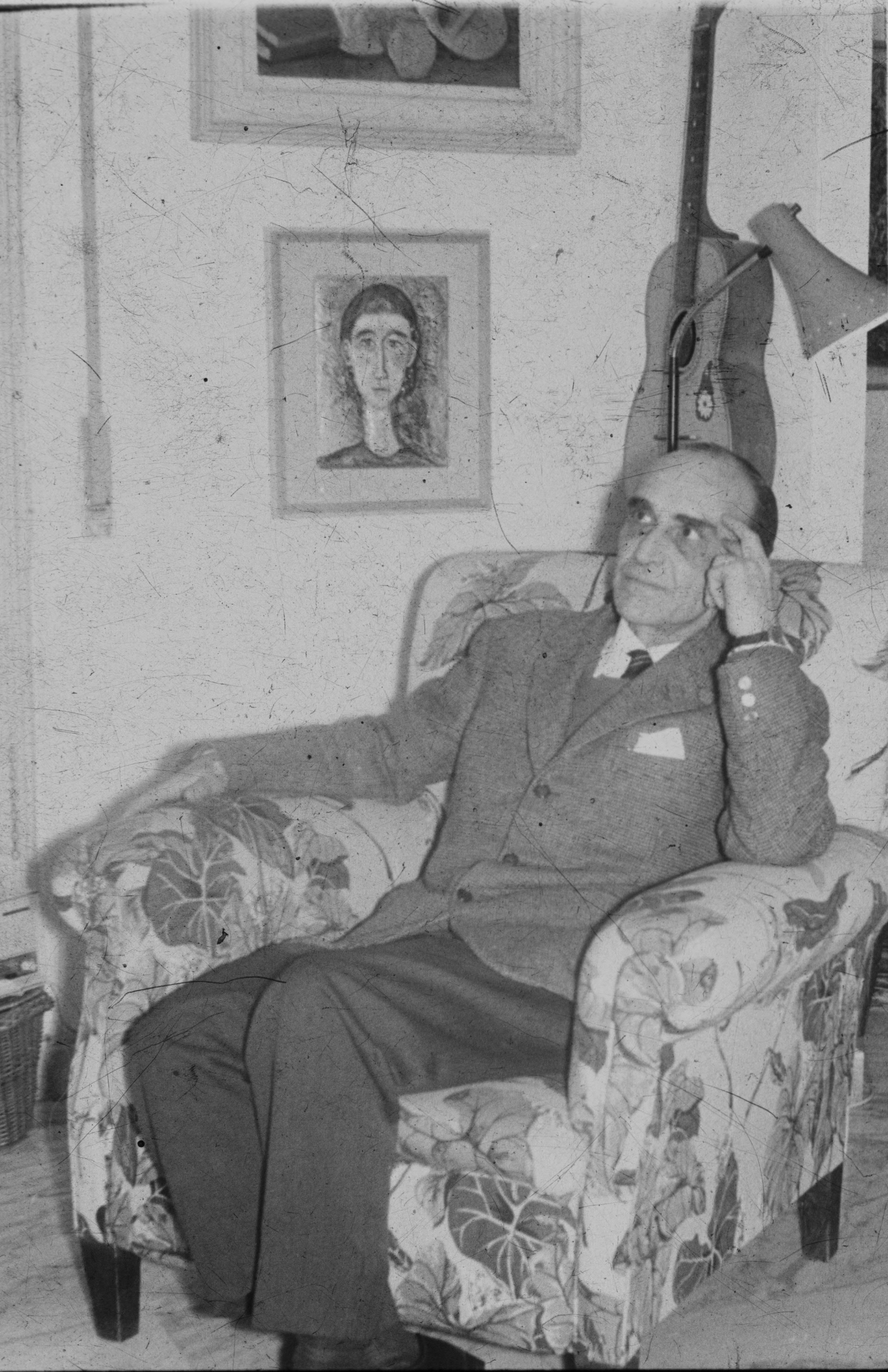 Adolfo Orrù pittore scultore incisore sardo.